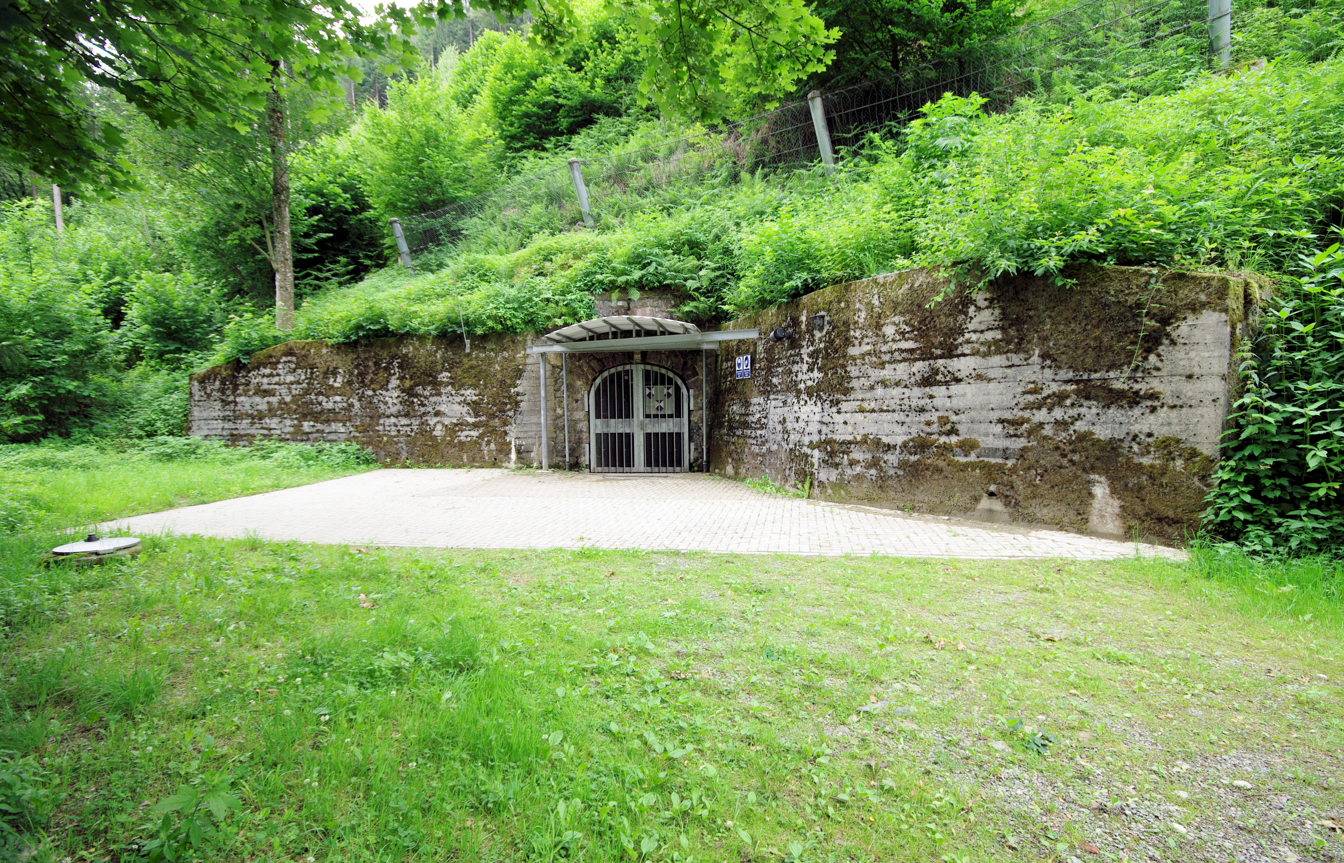 Der Barbarastollen, auch als Oberriedstollen bezeichnet, ist ein stillgelegter Versorgungsstollen des ehemaligen Schauinsland-Bergwerks bei Oberried in der Nähe von Freiburg im Breisgau. Er dient seit 1975 als Zentraler Bergungsort der Bundesrepublik Deutschland zur Lagerung von fotografisch archivierten Dokumenten mit hoher national- oder kulturhistorischer Bedeutung.